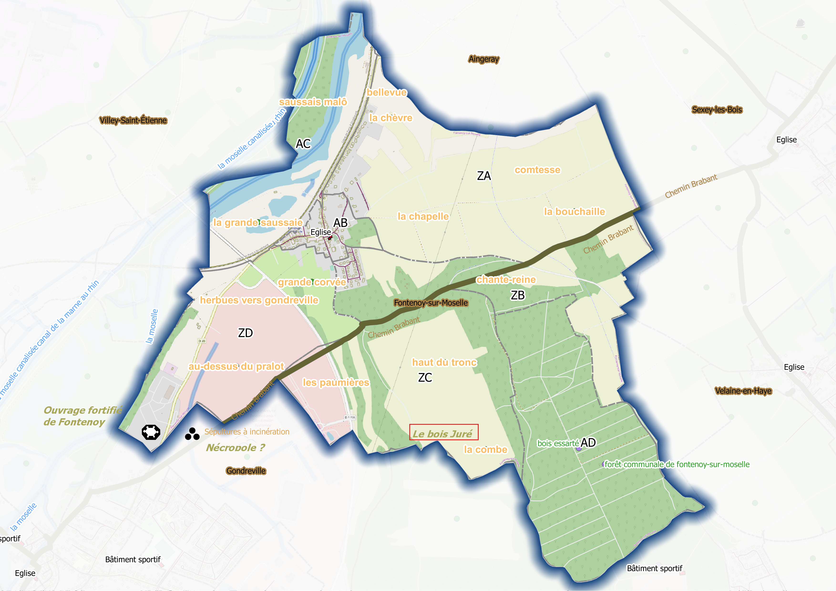 Fig1 - Fontenoy (ban communal)